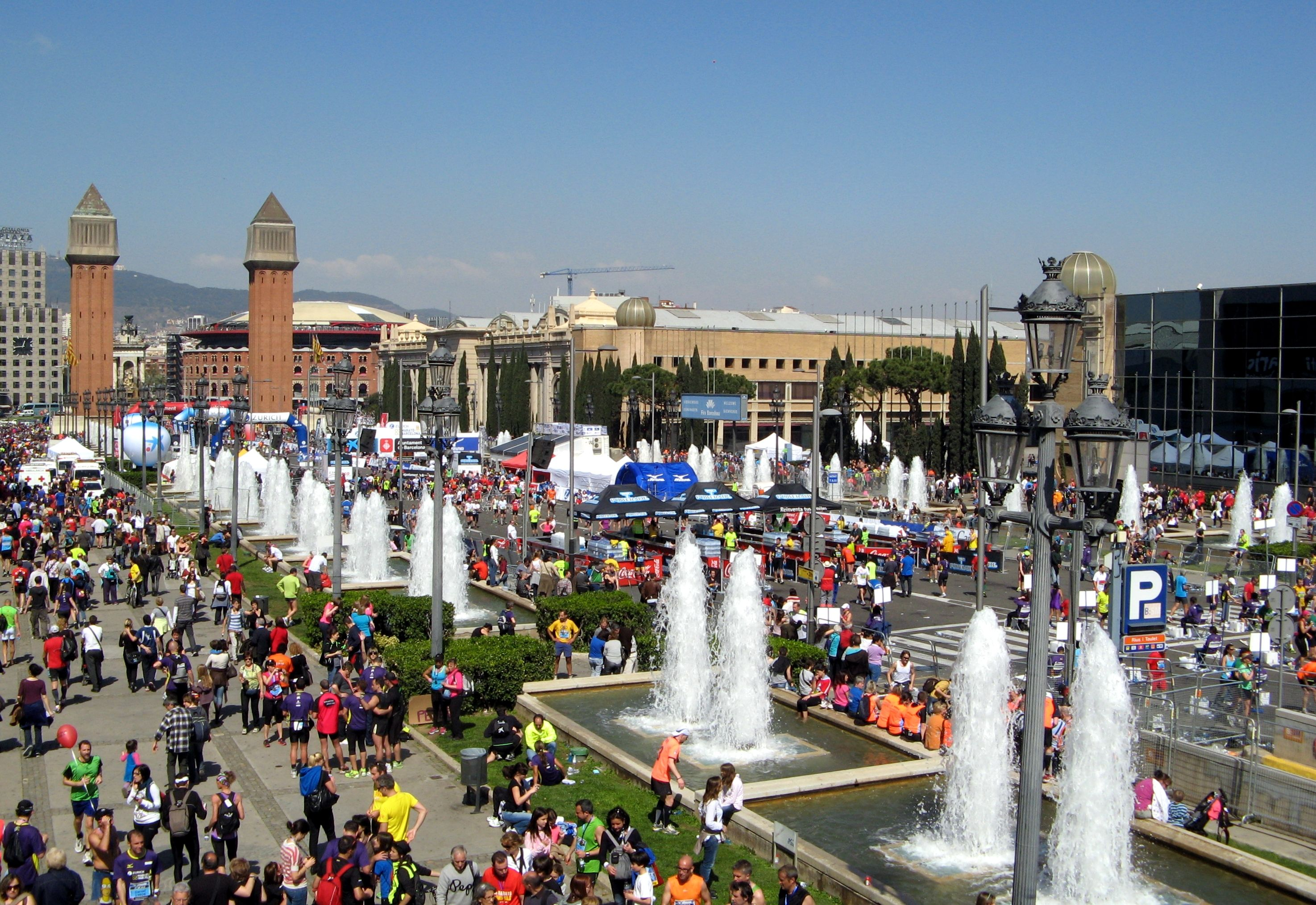 Després de la marató